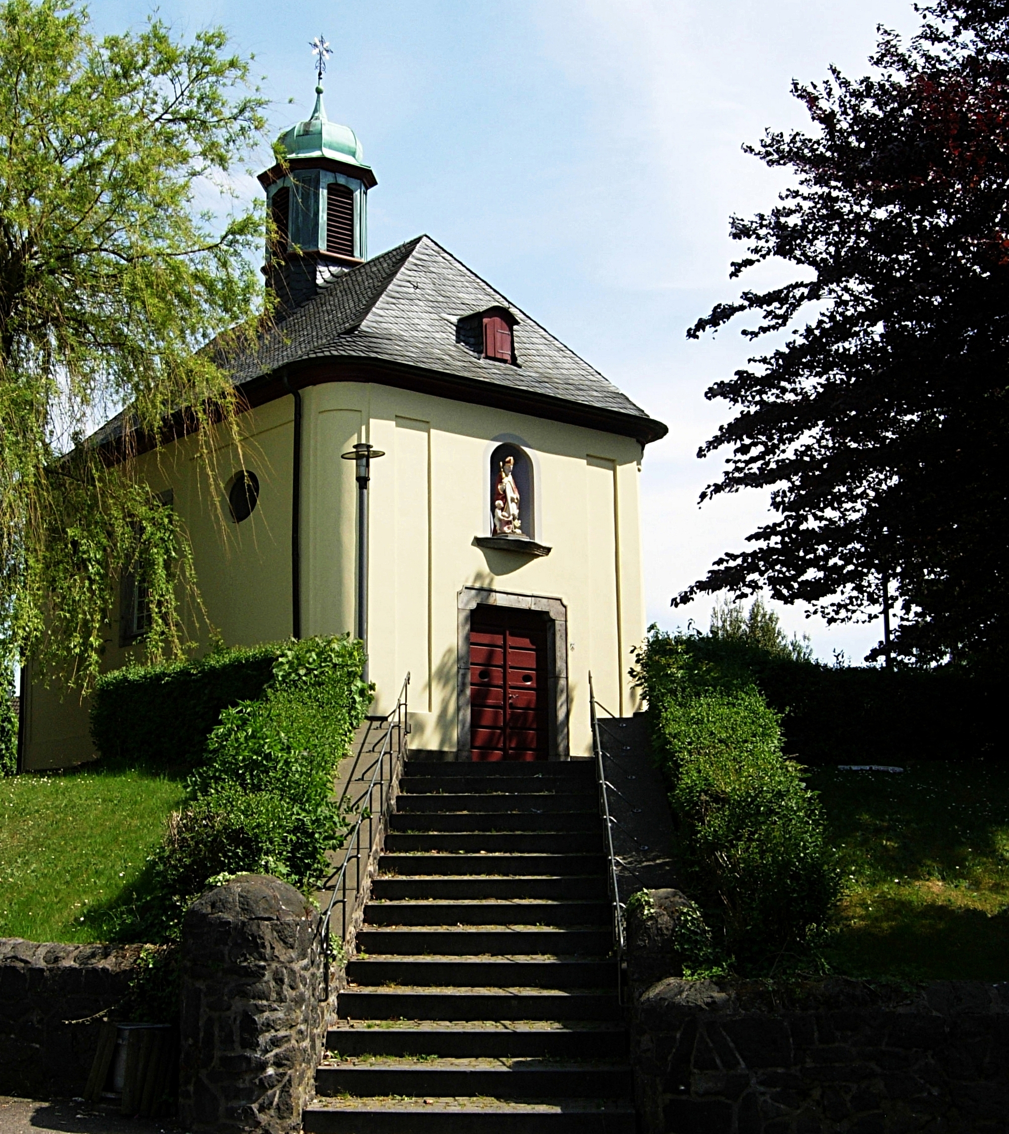 Nikolauskapelle (vgl. Nikolaus von Myra) an der Straßburger Straße in Sechtem, Stadt Bornheim, Baubeginn 1771, Konsekration 1775 This image shows a heritage building in Germany, located in the North Rhine-Westphalian city Bornheim (Rheinland) (no. 113).